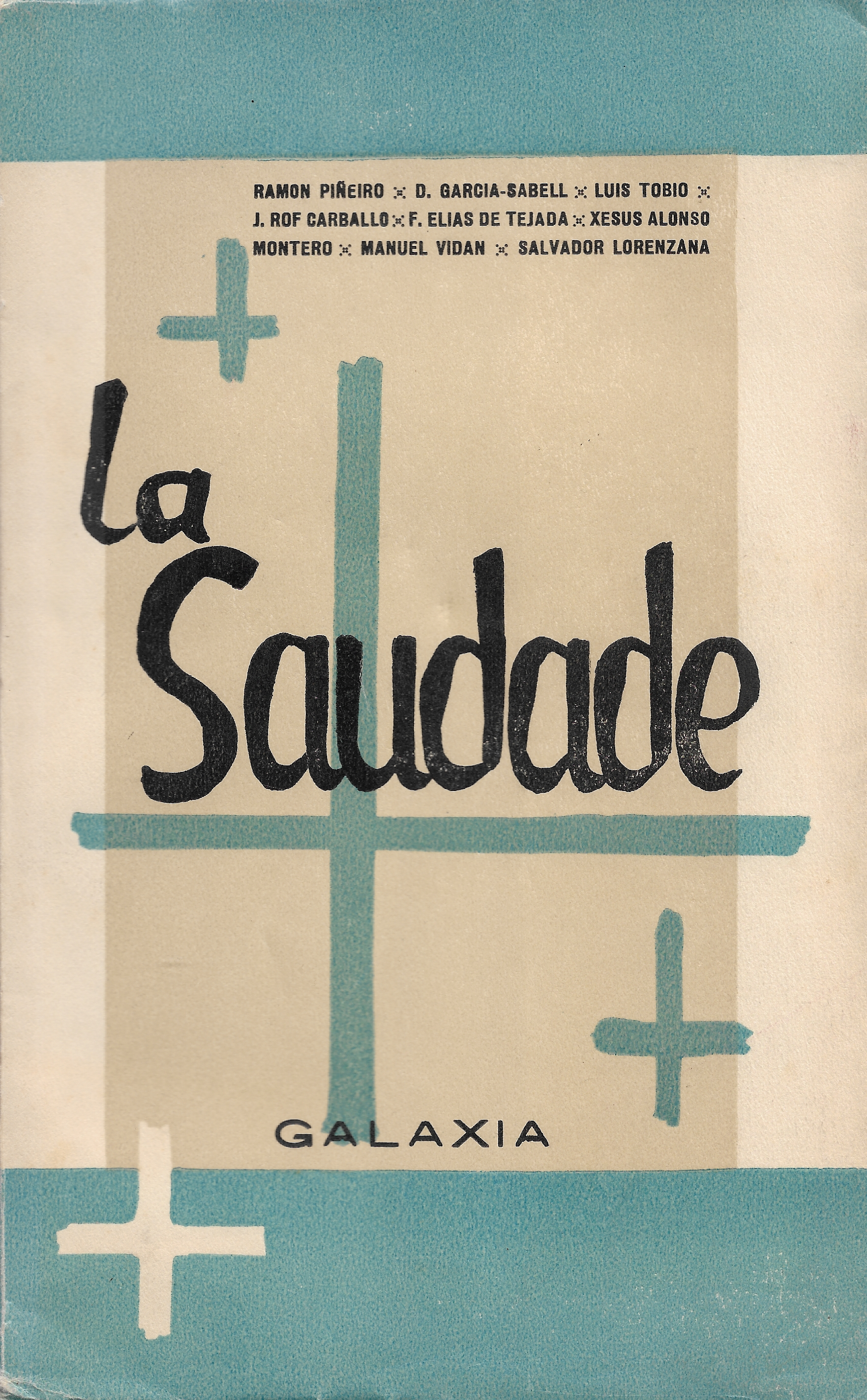 Portada da primeira edición do libro 'La Saudade' (1953), deseñada por Xohán Ledo